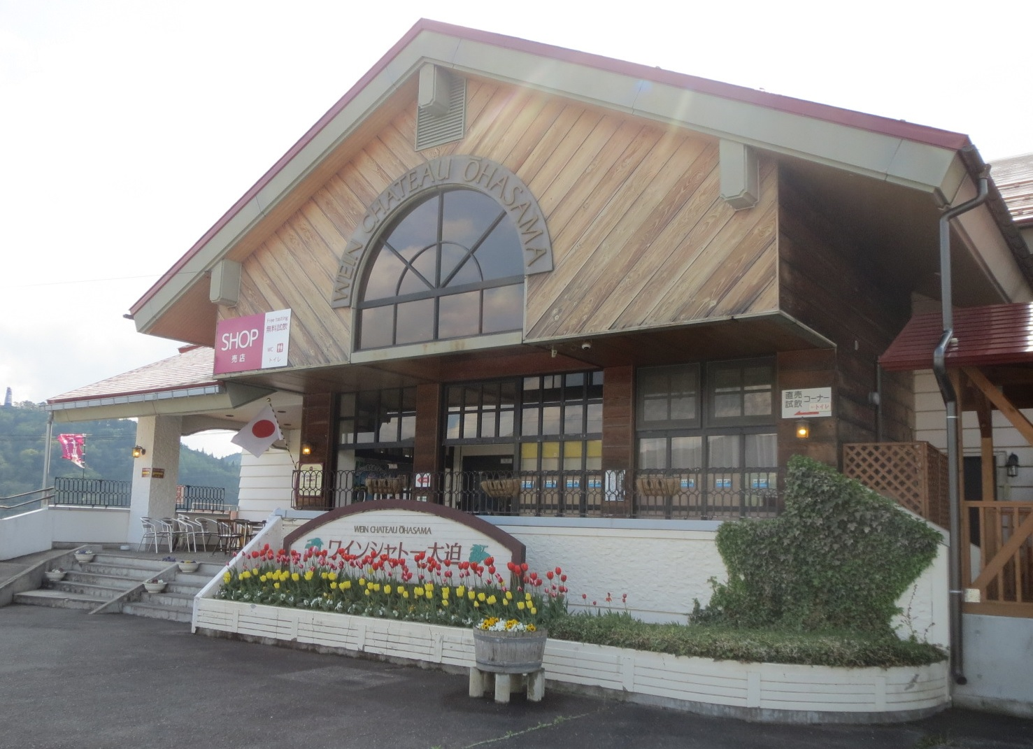 ワインシャトー大迫